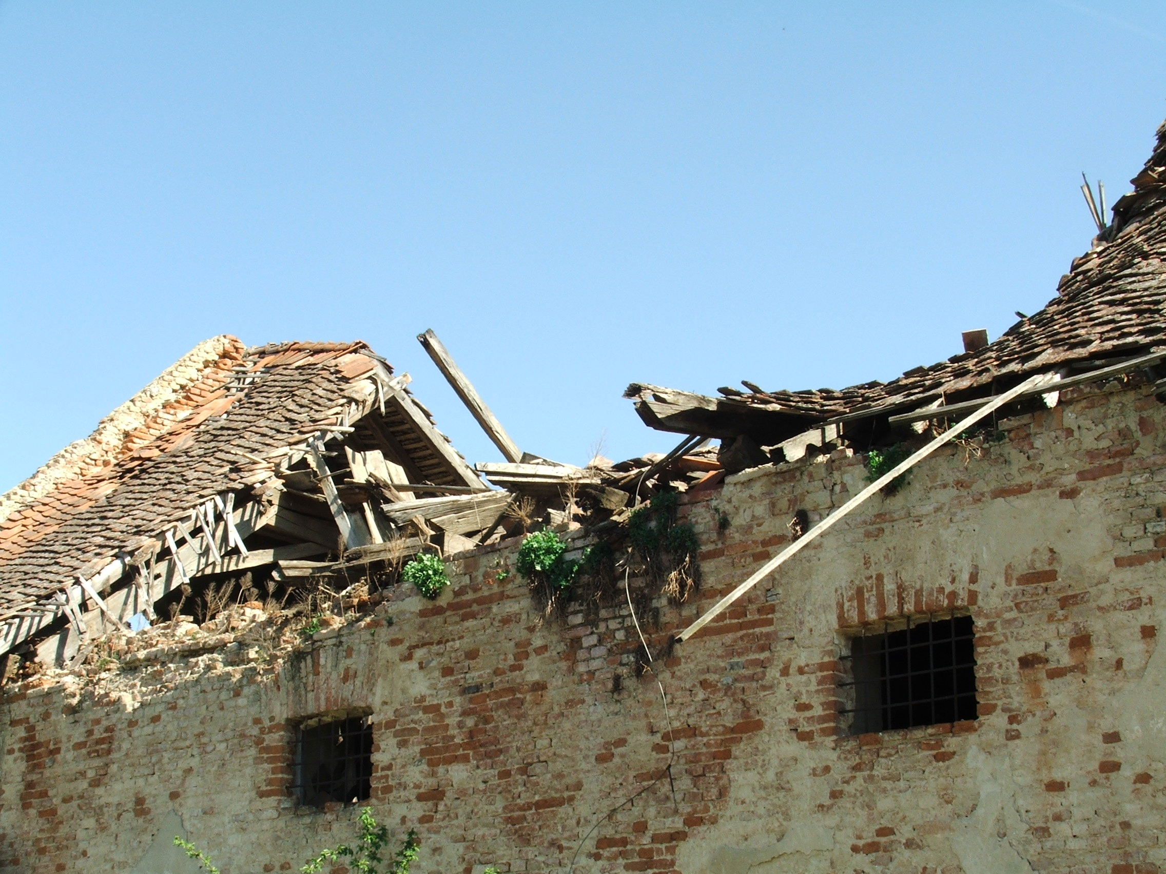 Nagyberki, magtár (Vigyázó kastély mellett) This is a photo of a monument in Hungary. Identifier: 8025